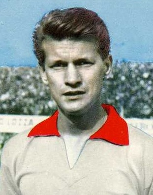 Kurt Andersson i Vareses matchdräkt 1965.